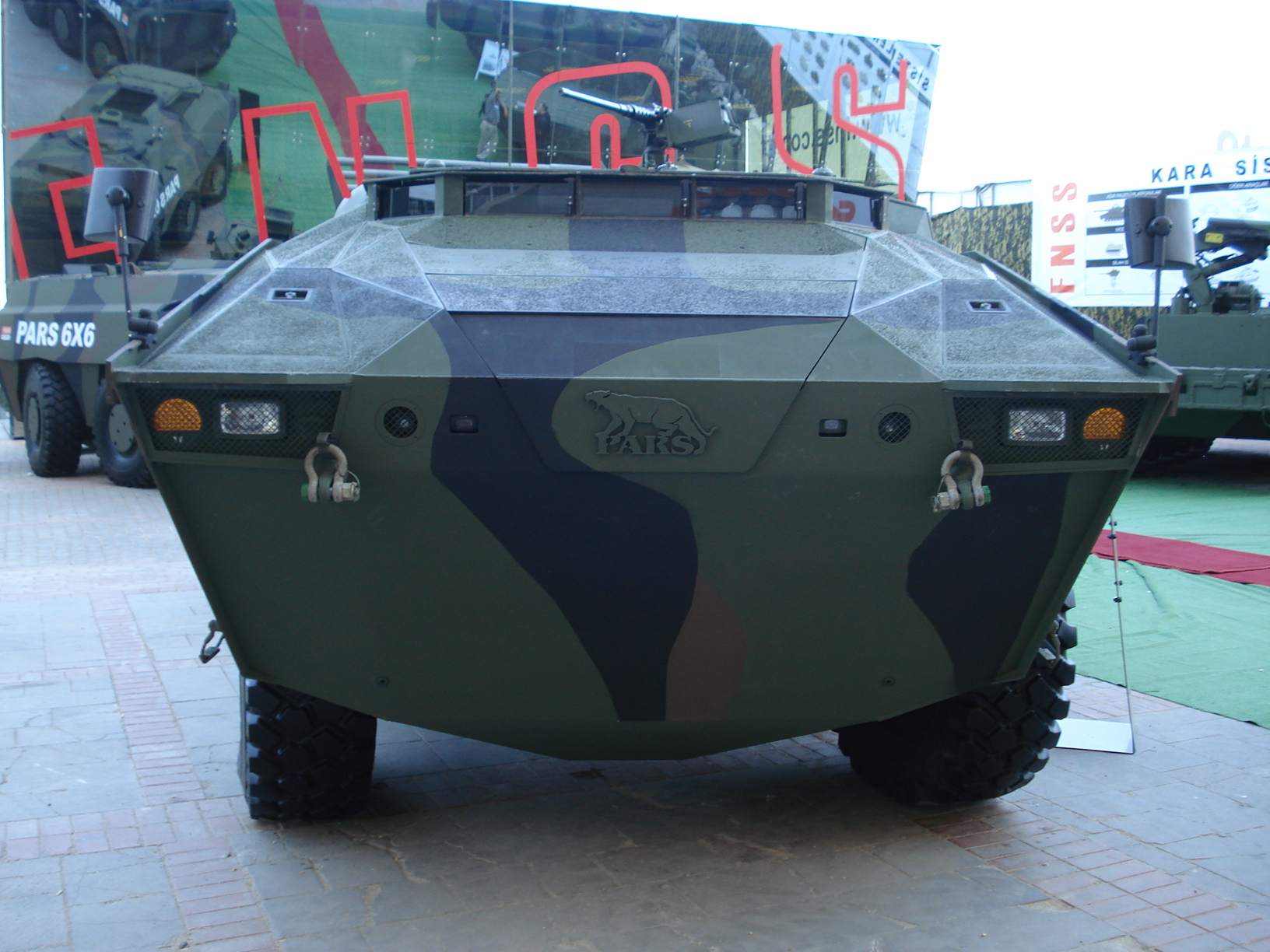 IDEF '07 Savunma Fuarı'nda çekildi.FNSS Pars. 23 Mayıs 2007